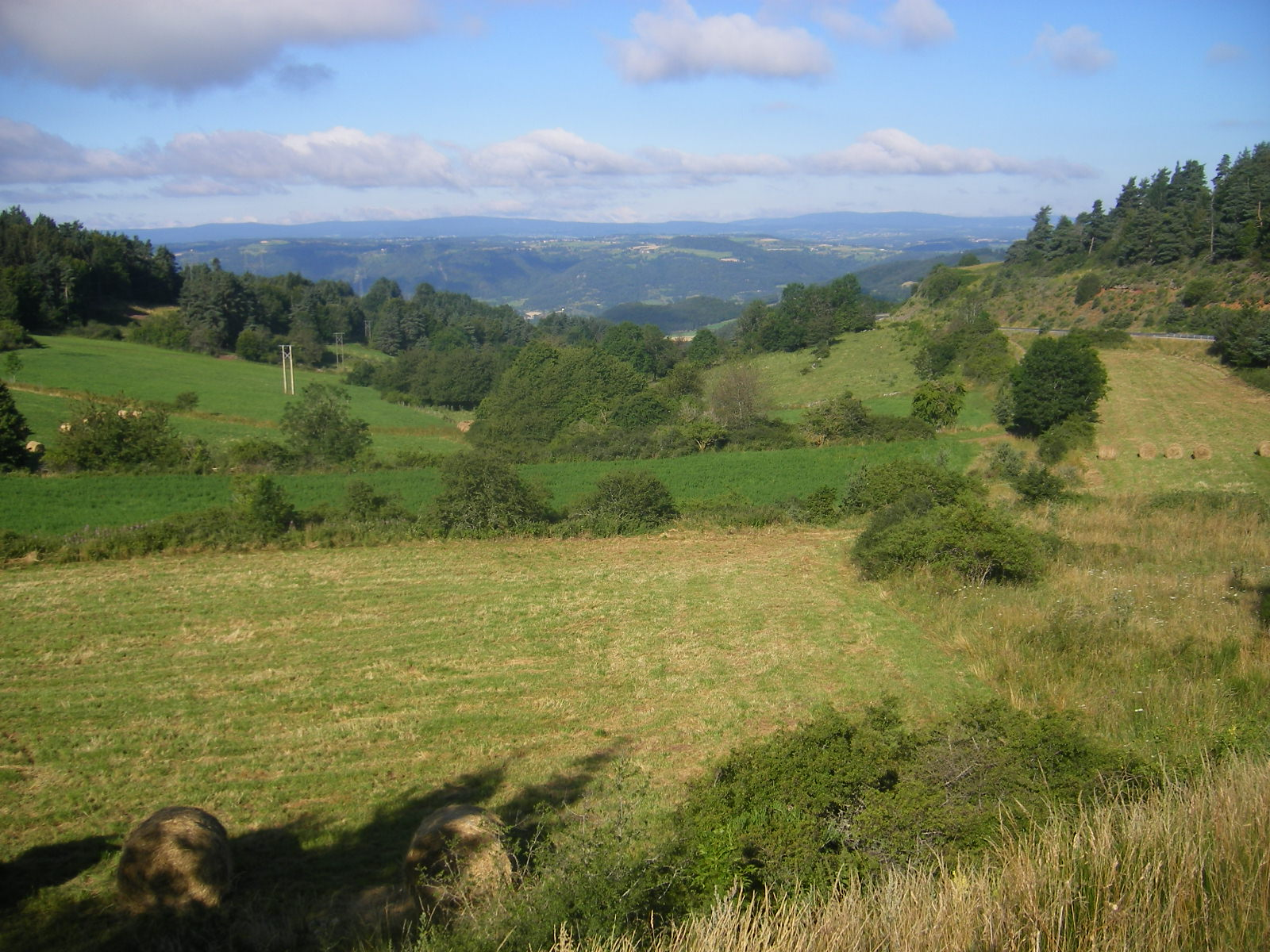 Monts du Devés between Bains and Saint-Privat-d´Allier